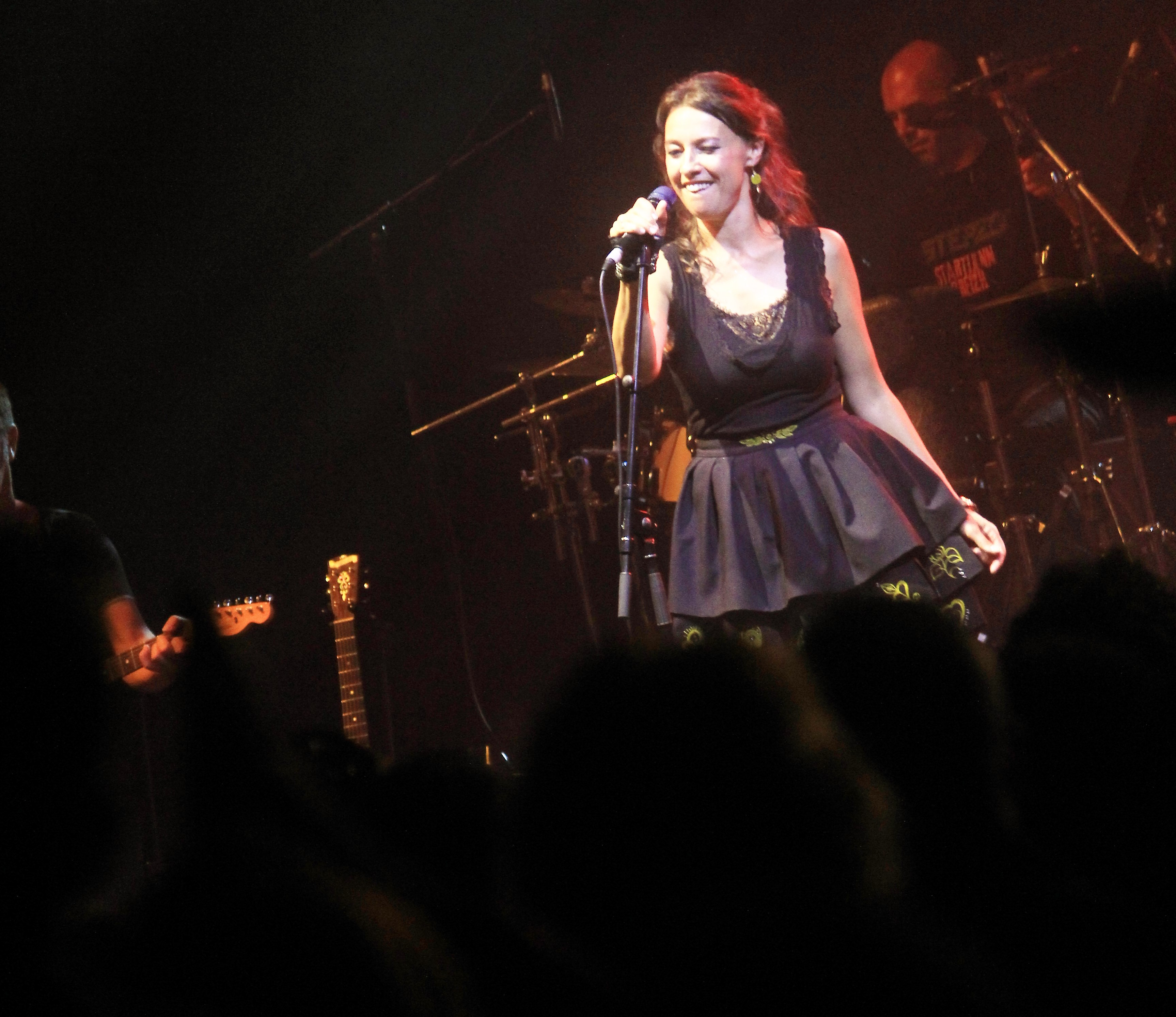 Concert de Gwennyn au festival interceltique de Lorient 2017, en première partie d'Amy Macdonald.